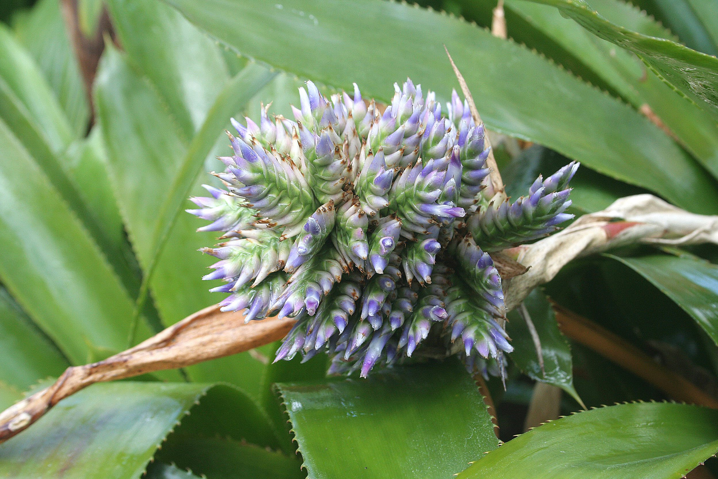 Aechmea serrata, Conservatoire botanique national de Brest, France, juin 2007